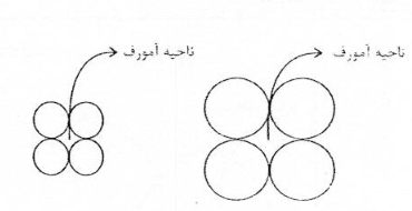 ناحیه آمورف